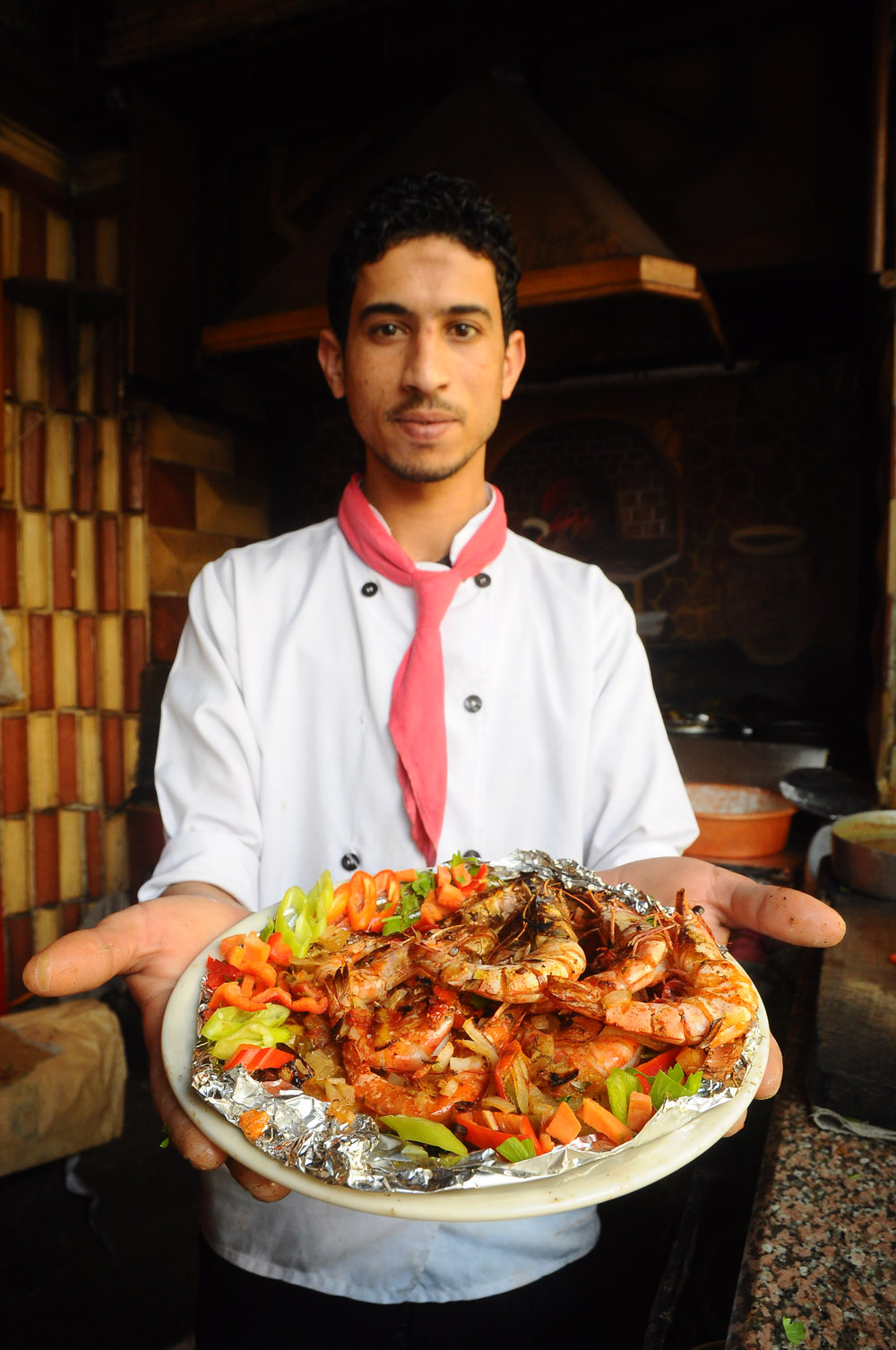 مصرى: يقدم الجمبرى مشوى عادة فى المدن المصرية الساحلية This is an image of food from Egypt